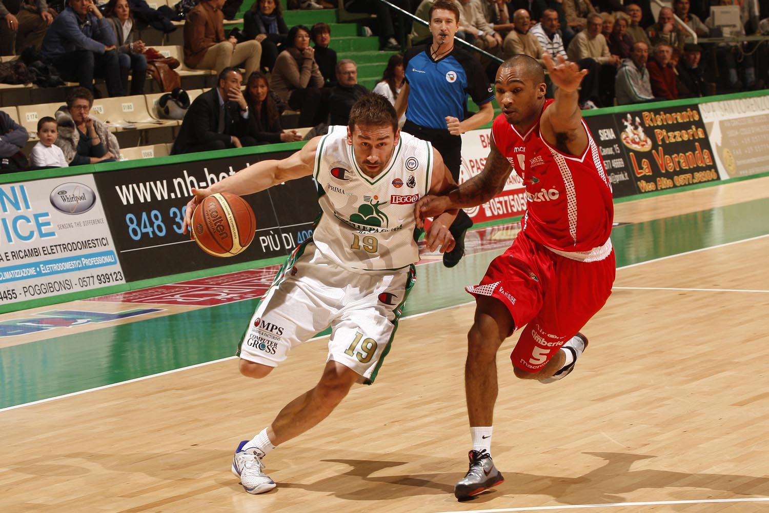 Marko Jaric e Phil Goss